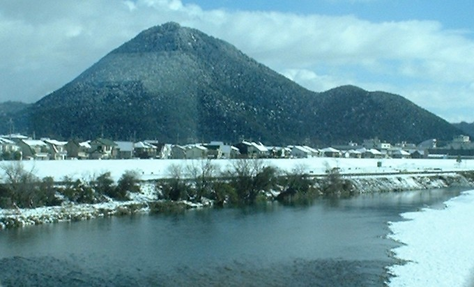 薄雪のja:三上山とja:野洲川 東海道本線 守山～野洲間車中から